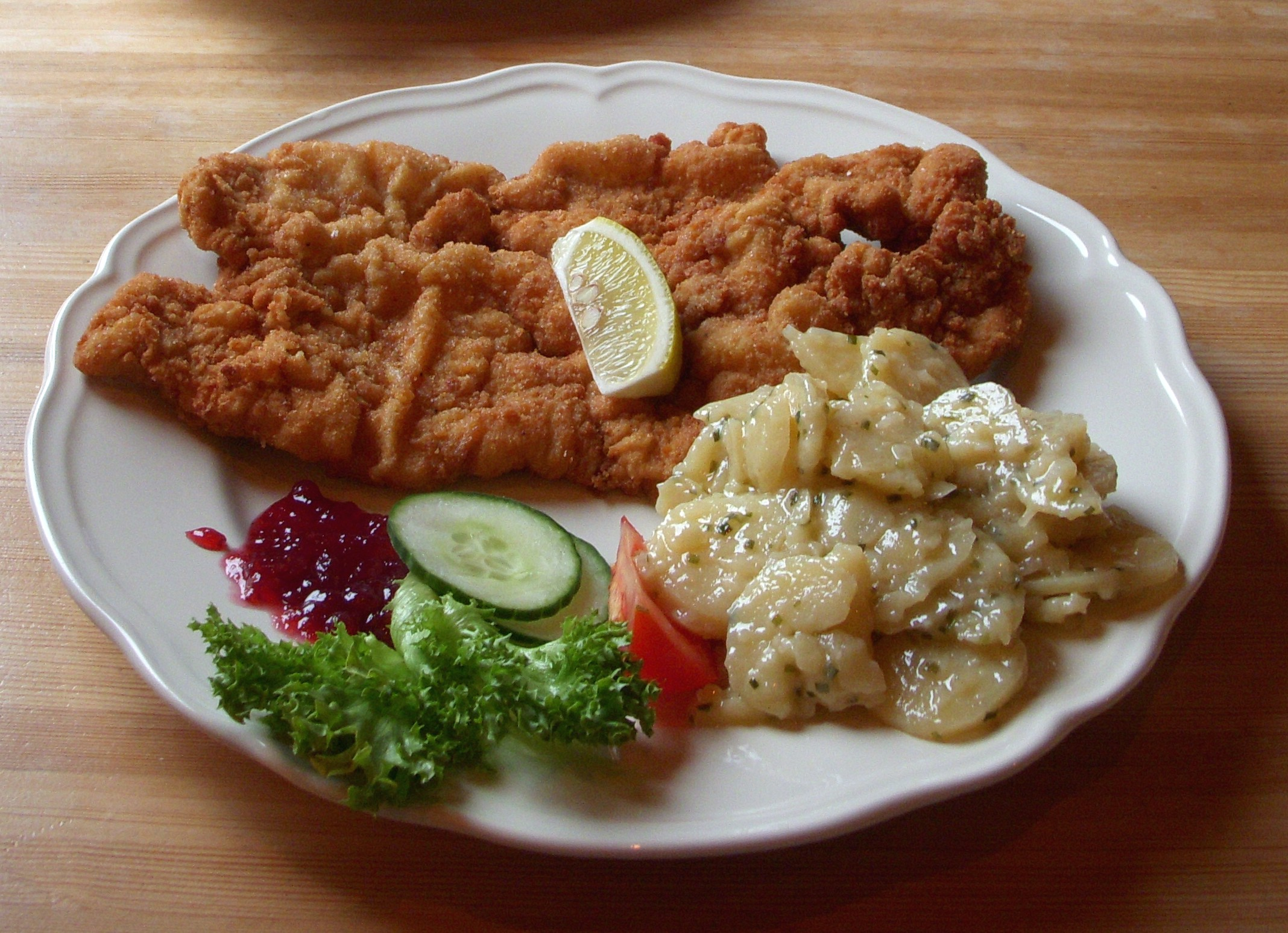 Wiener Schnitzel vom Kalb mit Kartoffelsallat